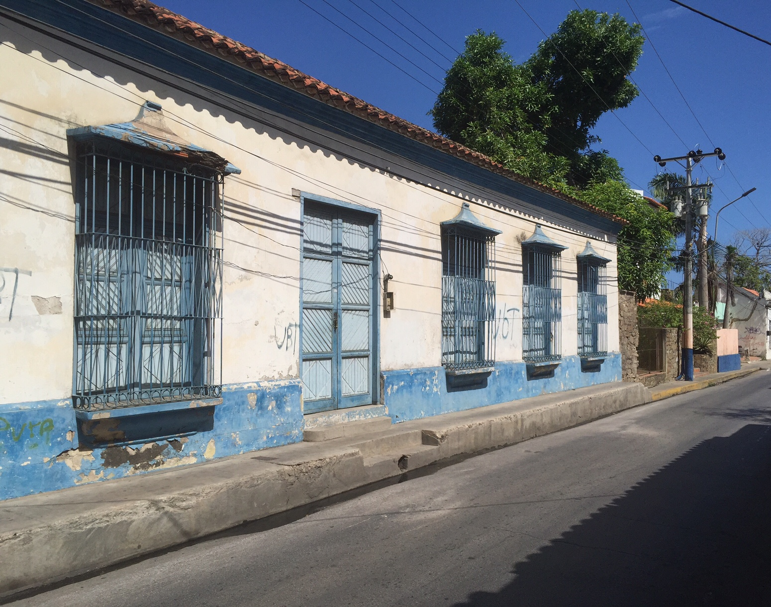 Casa natal de Jóvito Villalba en Pampatar, Isla de Margarita, Venezuela.